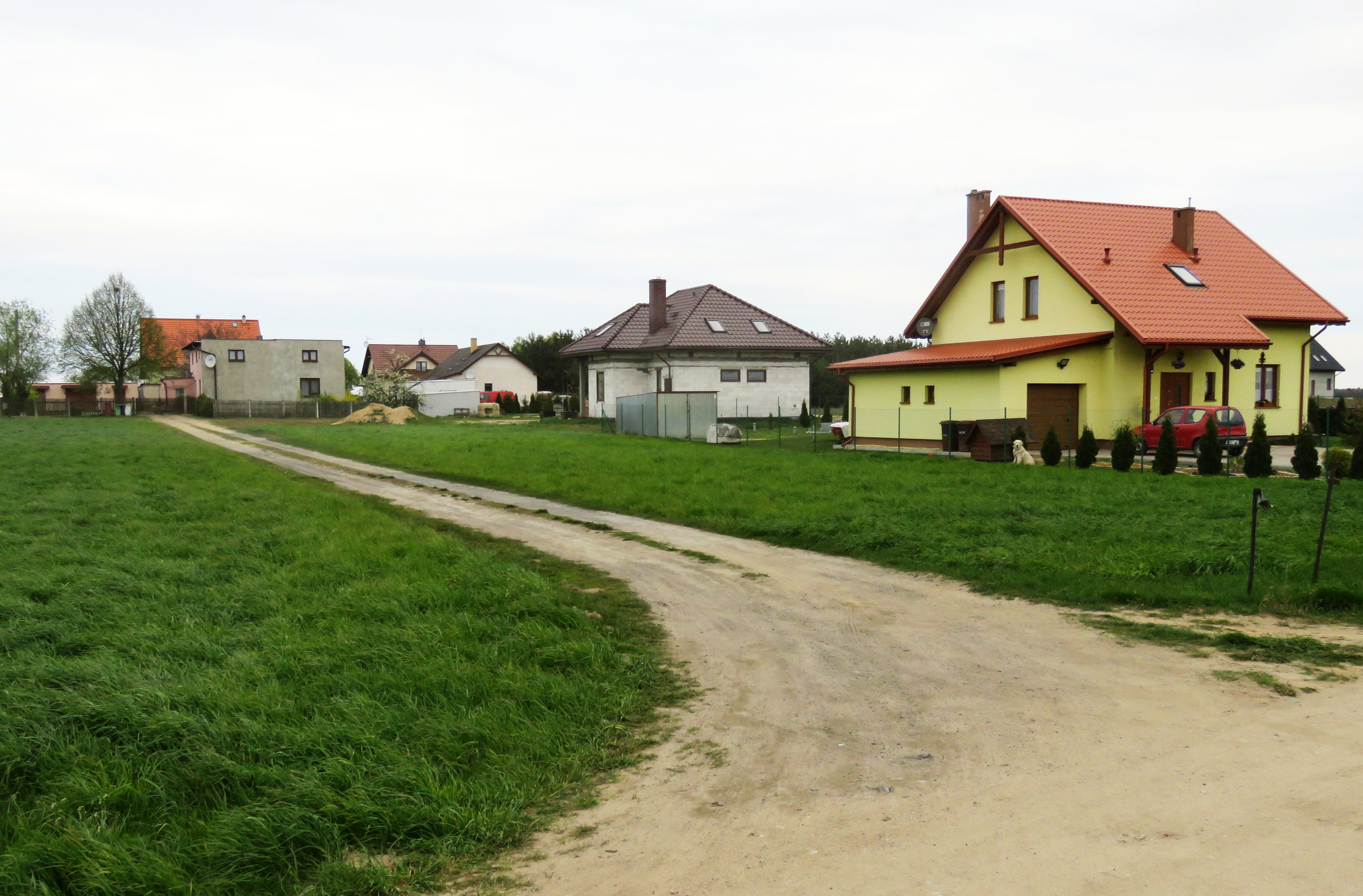 Kruszynki, gmina Brodnica